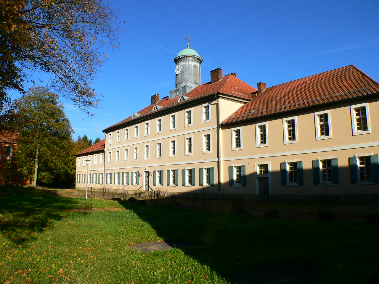 Domäne Beberbeck, Oberhof